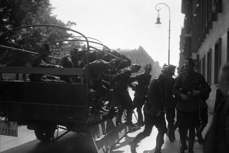 Berliner Schutzpolizei verläßt Streifenwagen.